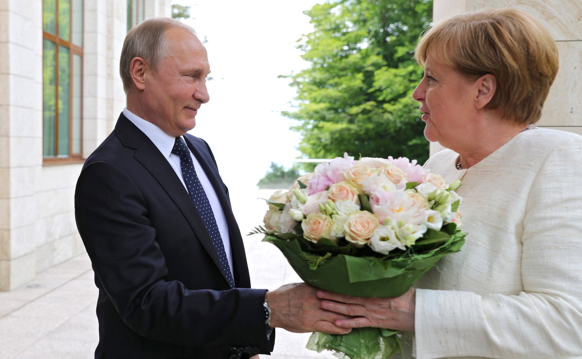 Прибытие Федерального канцлера Германии Ангелы Меркель на переговоры с Президентом России Владимиром Путиным